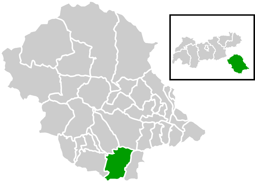 Lage der Gemeinde innerhalb des Bezirks Lienz